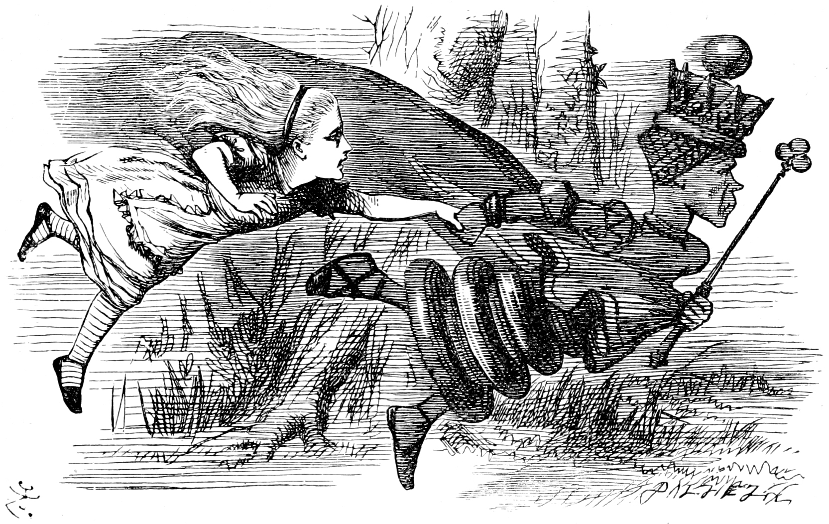 гравюра Джона Тенниела